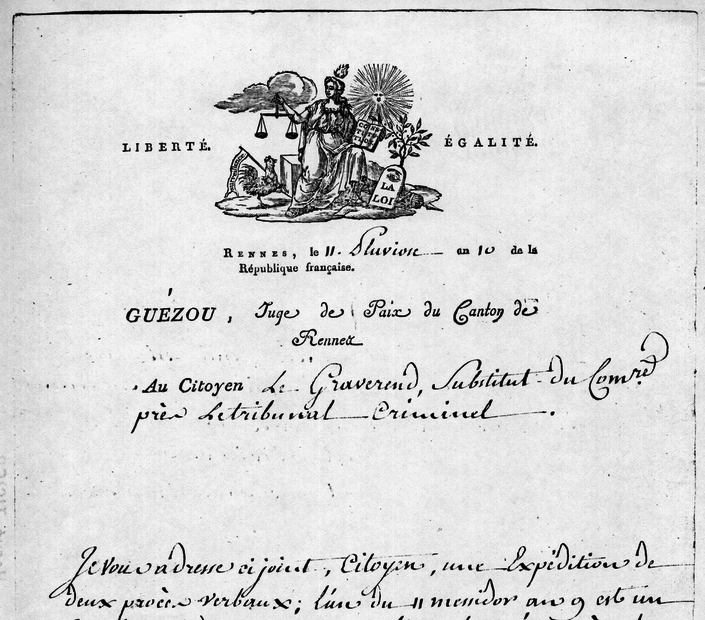 En-tête d'un juge de paix (Jean-Honorat Guézou) en France en l'an X.